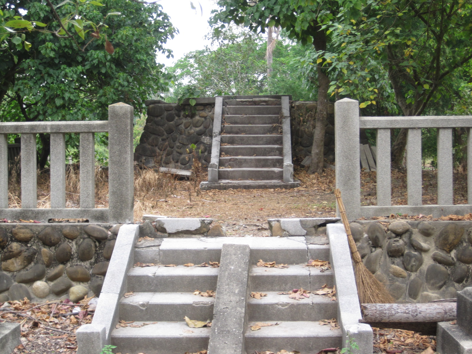 三崁店神社基壇。